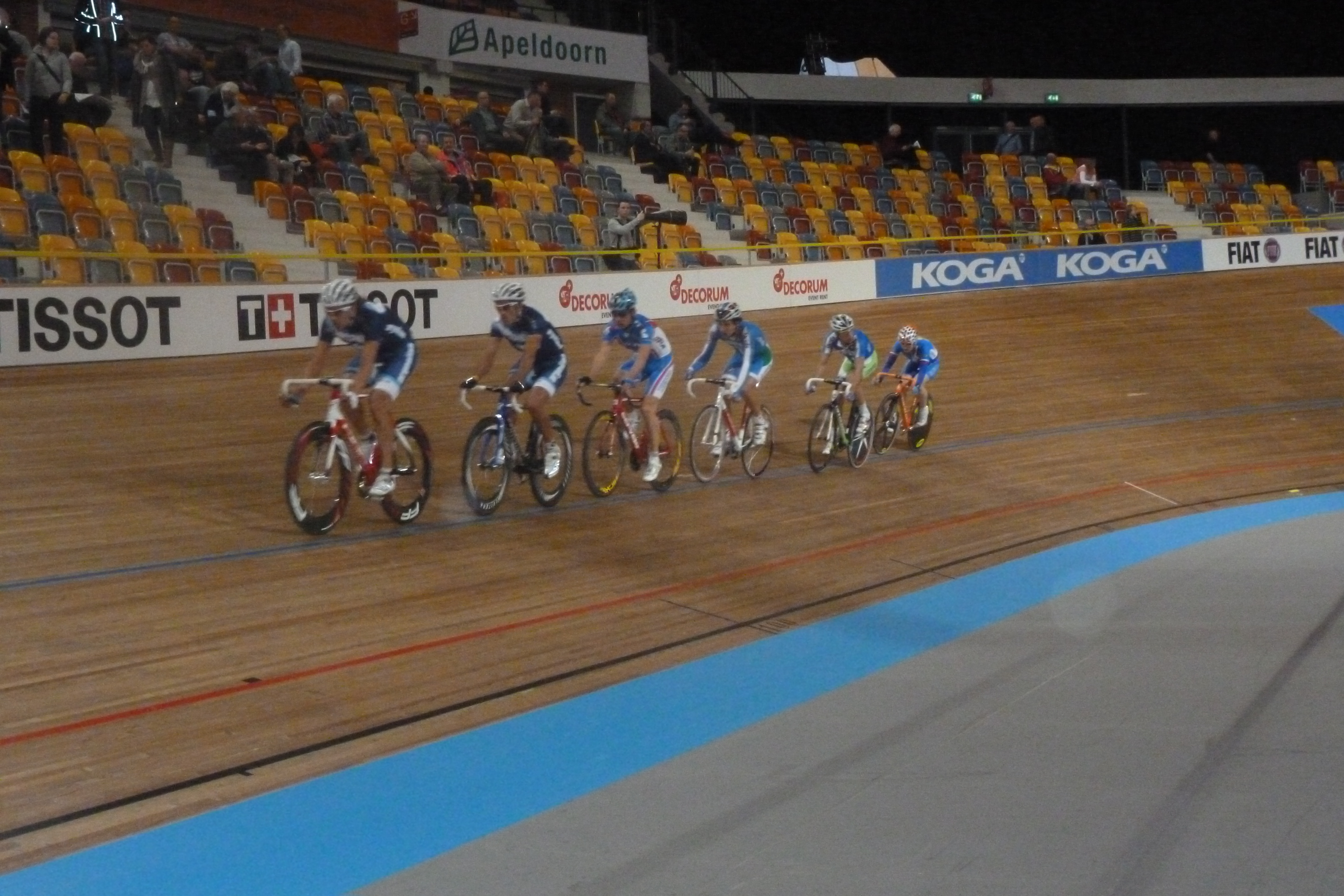 Cote d'azur in der Halle Omnisport Apeldoorn